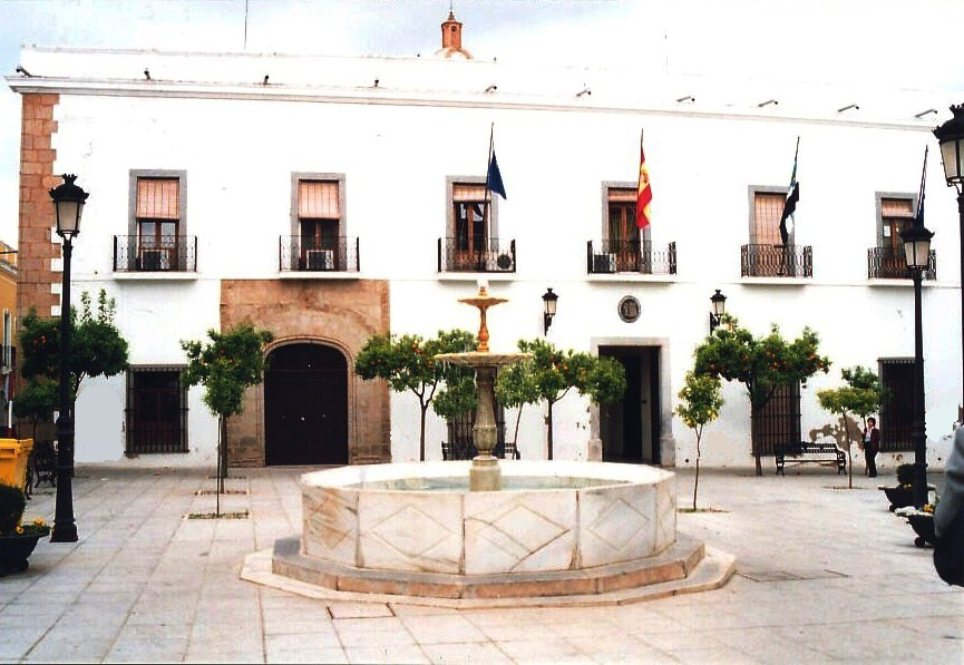 Ayuntamiento de Zafra